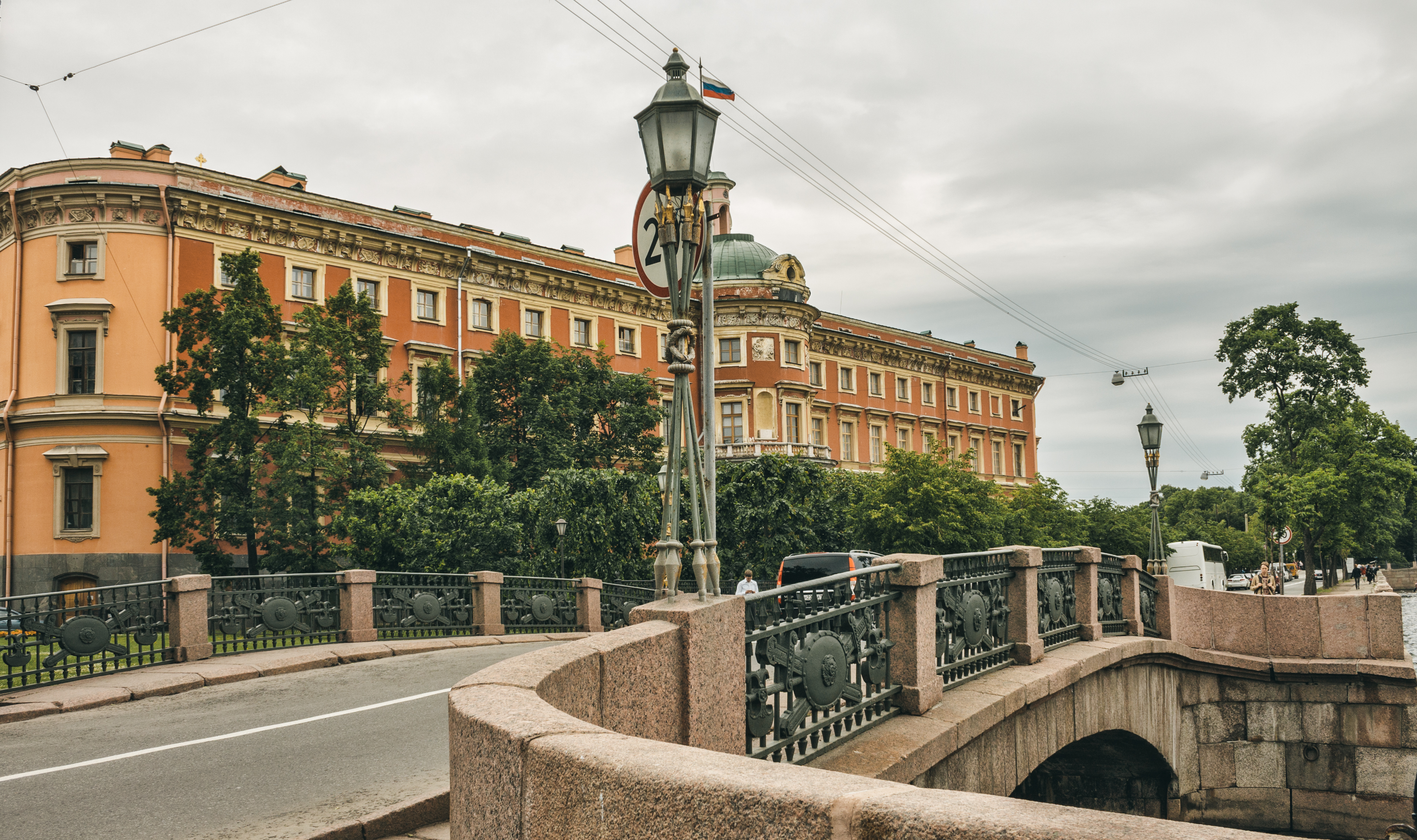 Замок: улица Садовая, 2, Центральный район, Санкт-Петербург